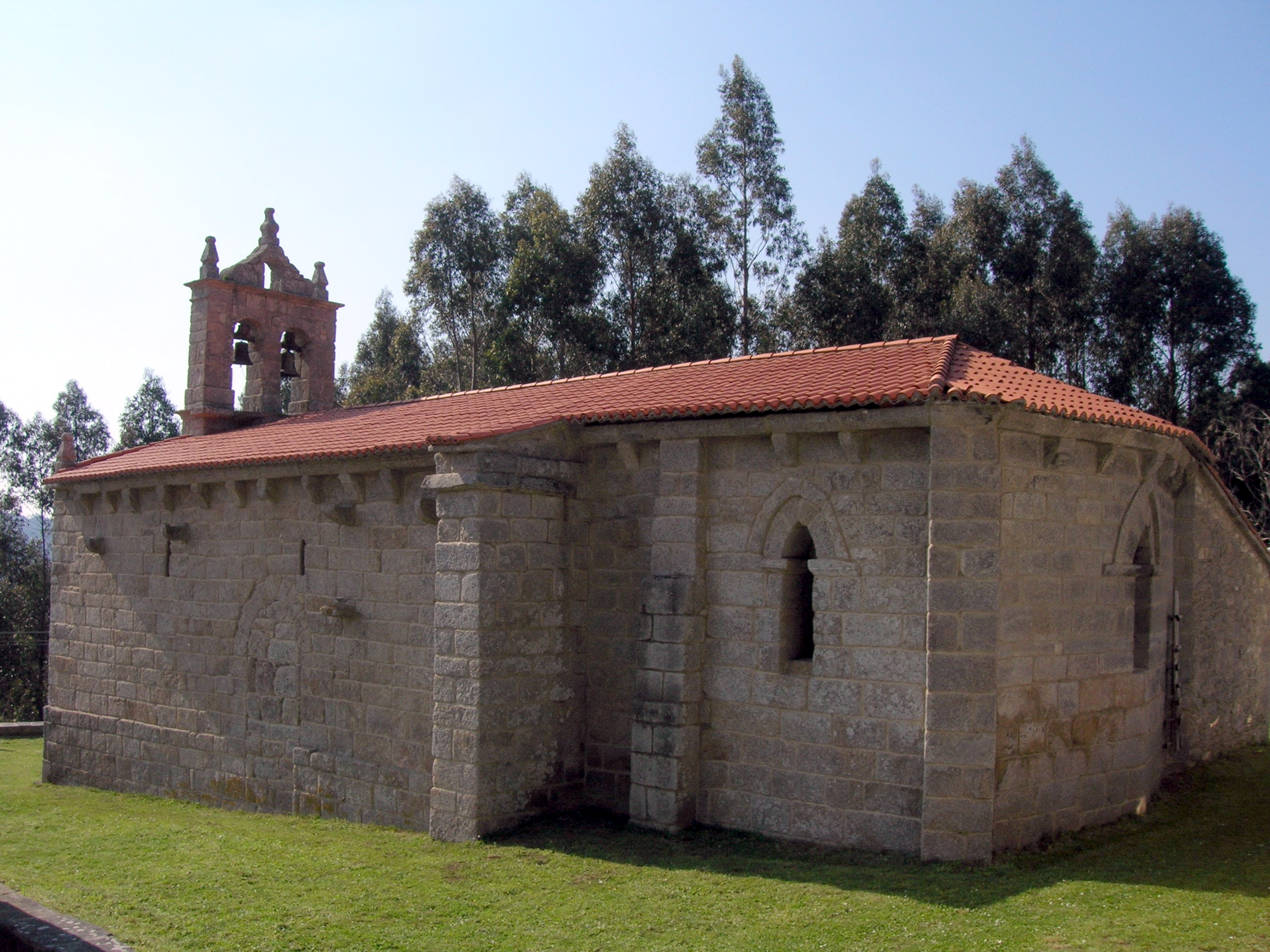 Tiene planta de nave única y ábside rectangular. En el muro sur de la nave, encontramos una sencilla portada tapiada y canecillos en la cornisa.